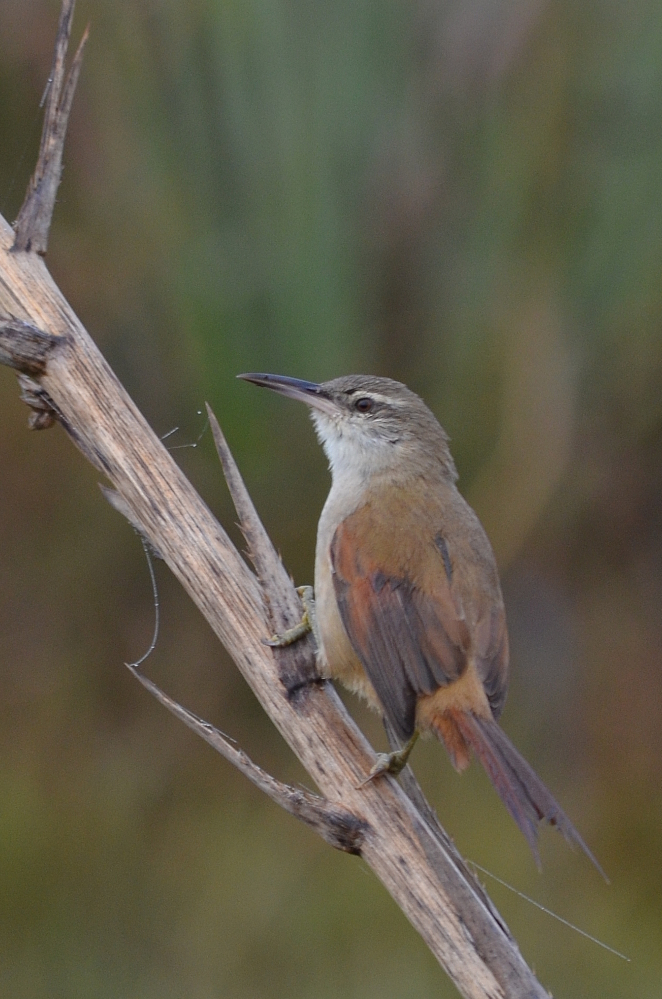 Pajonalera de pico recto Limnoctites rectirostris en el Departamento de Treinta y Tres, Uruguay.